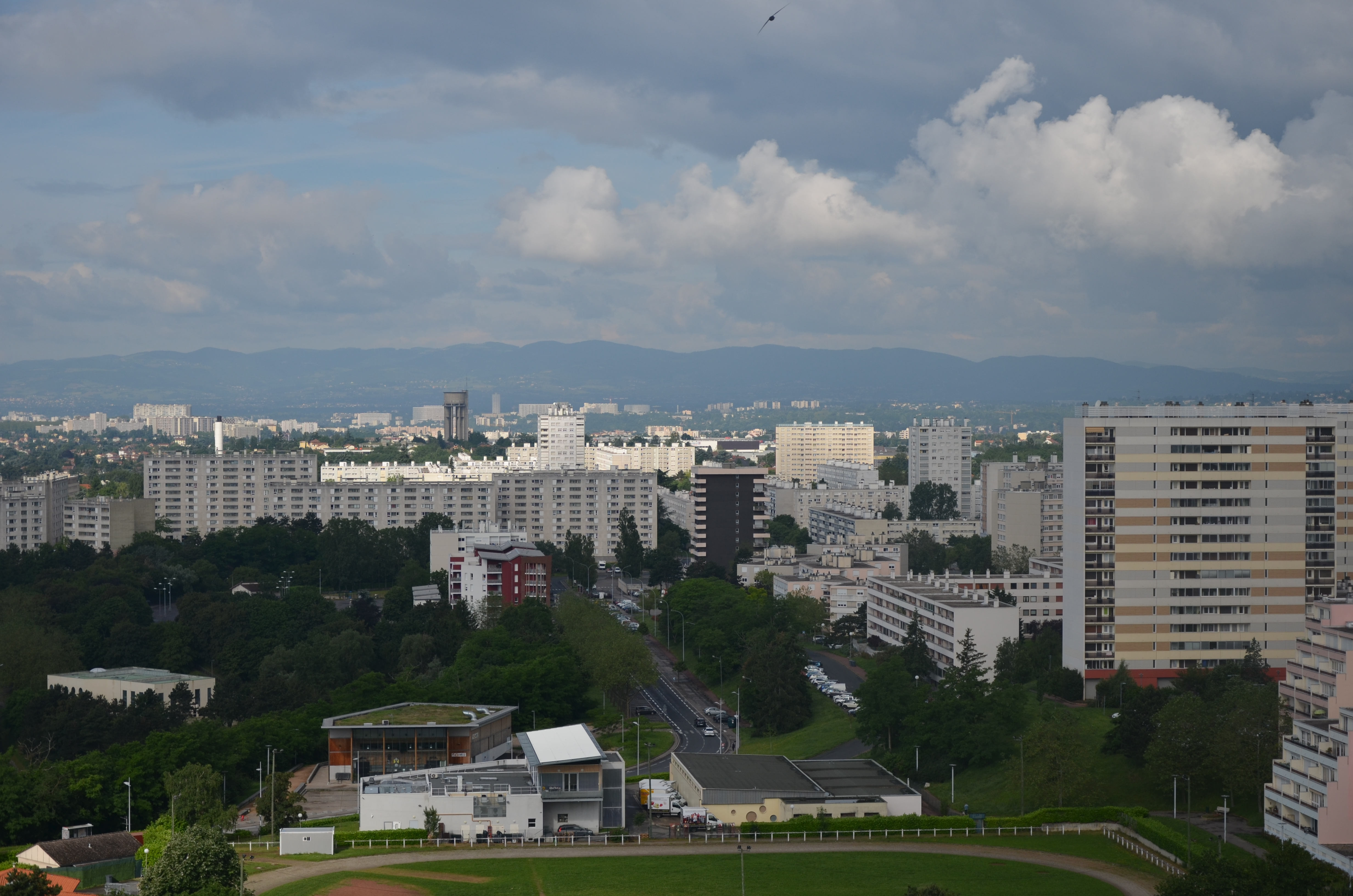 vue Rillieux-la-Pape